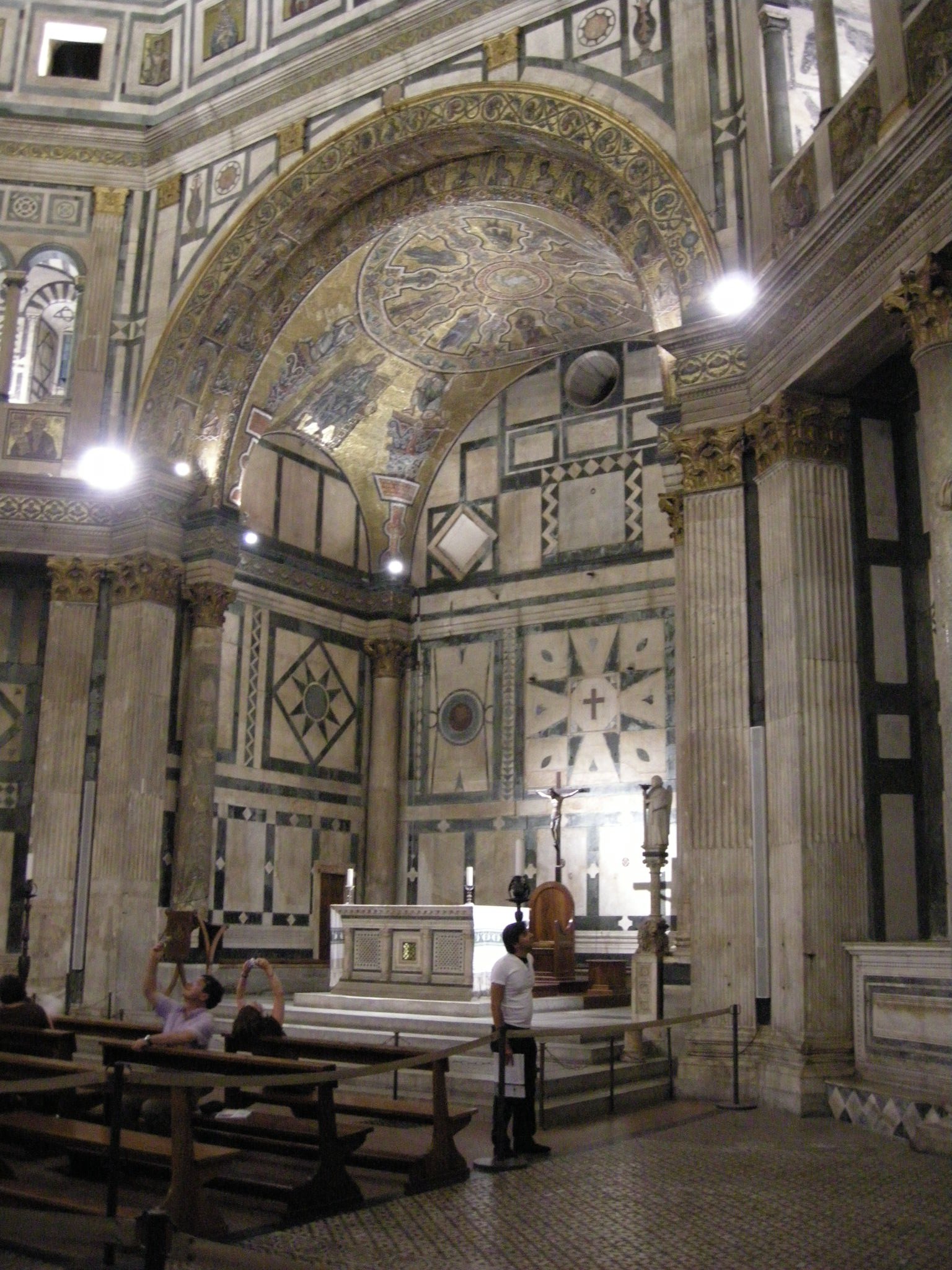 Battsitero, altare centrale 02